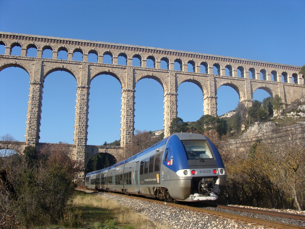 Une rame TER (série B 81500) Briançon - Marseille détournée par Rognac passe sous l'aqueduc de Roquefavour, décembre 2008 (voir Ligne Rognac - Aix-en-Provence).